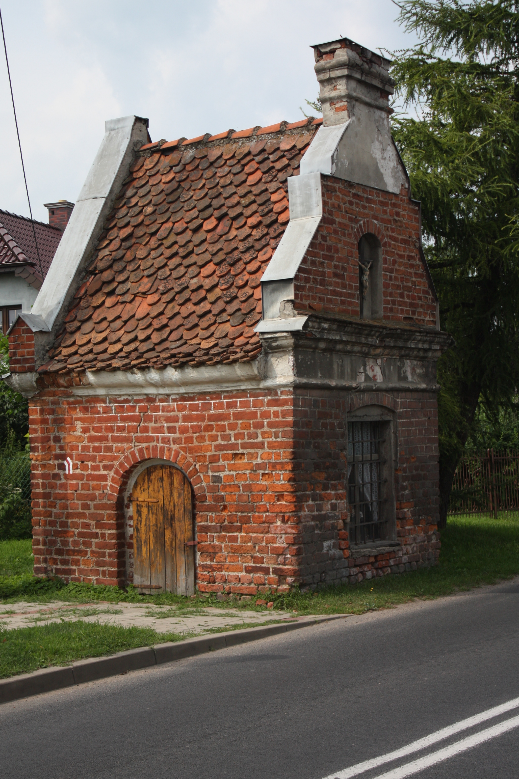 Dobre Miasto - kaplica p.w. św. Jerzego z otoczeniem 50 - 100 m, XVIII You can see all photographs in category Wikiekspedycja 2012. The making of this document was supported by Wikimedia Polska.